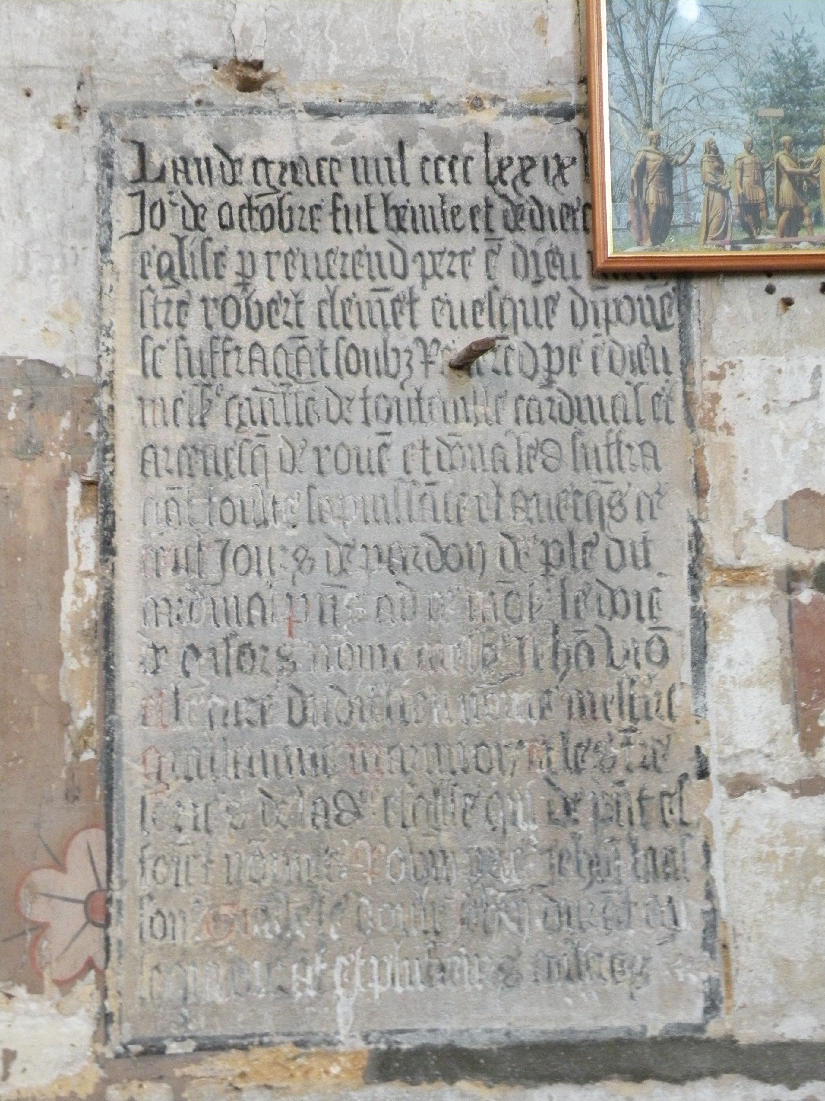 Église Saint-Denis de Sérifontaine plaque commémorative de la consécration de l'église Transcription : " L'an de grâce Mil CCCC LXXIX le XVIIIe jour de octobre fut benite et dedie ceste/eglise p[ar] réverend père e[t] Dieu mai/stre Robert Clement evesque [...] / suffragant soulz reverend père et Dieu messire Guillaume (?) de Touteville cardinal et/archevêque de Rouen et donat [...] suffra/gant souls sa puissance et [...] / [...] jour de pardon et [...] dudit [...]messes/[...] ".